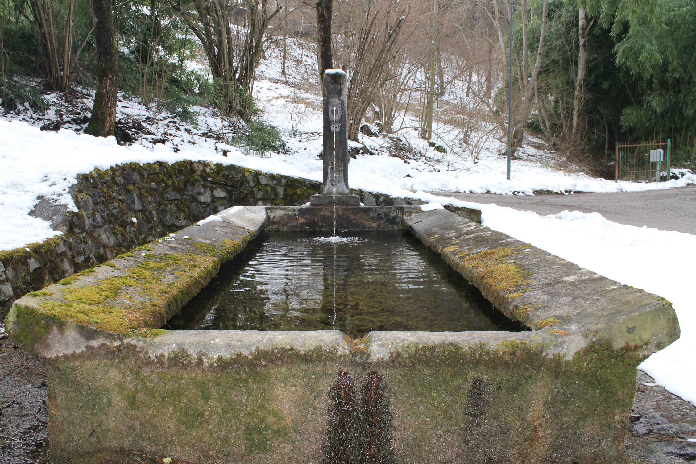 Fontana Carzano